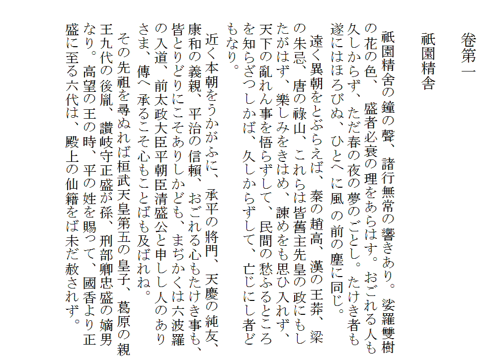 平家物語･祇園精舎サンプル